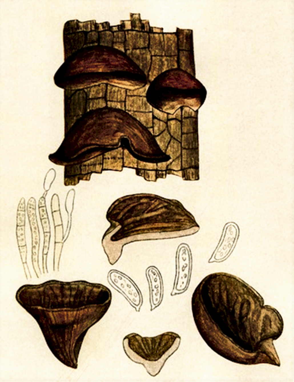 Giacomo Bresadola: Hirneola auricula P. Karst., today Auricularia auricula-judae (Bull.) J.Schröt.